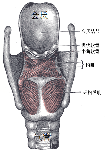 喉部肌肉。后视图。